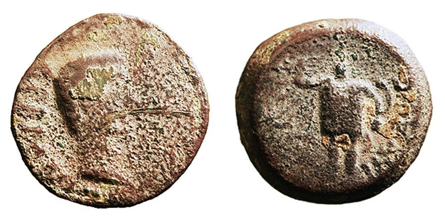 Semis emitido en Ebusus (Ibiza) bajo Calígula. En bronce.